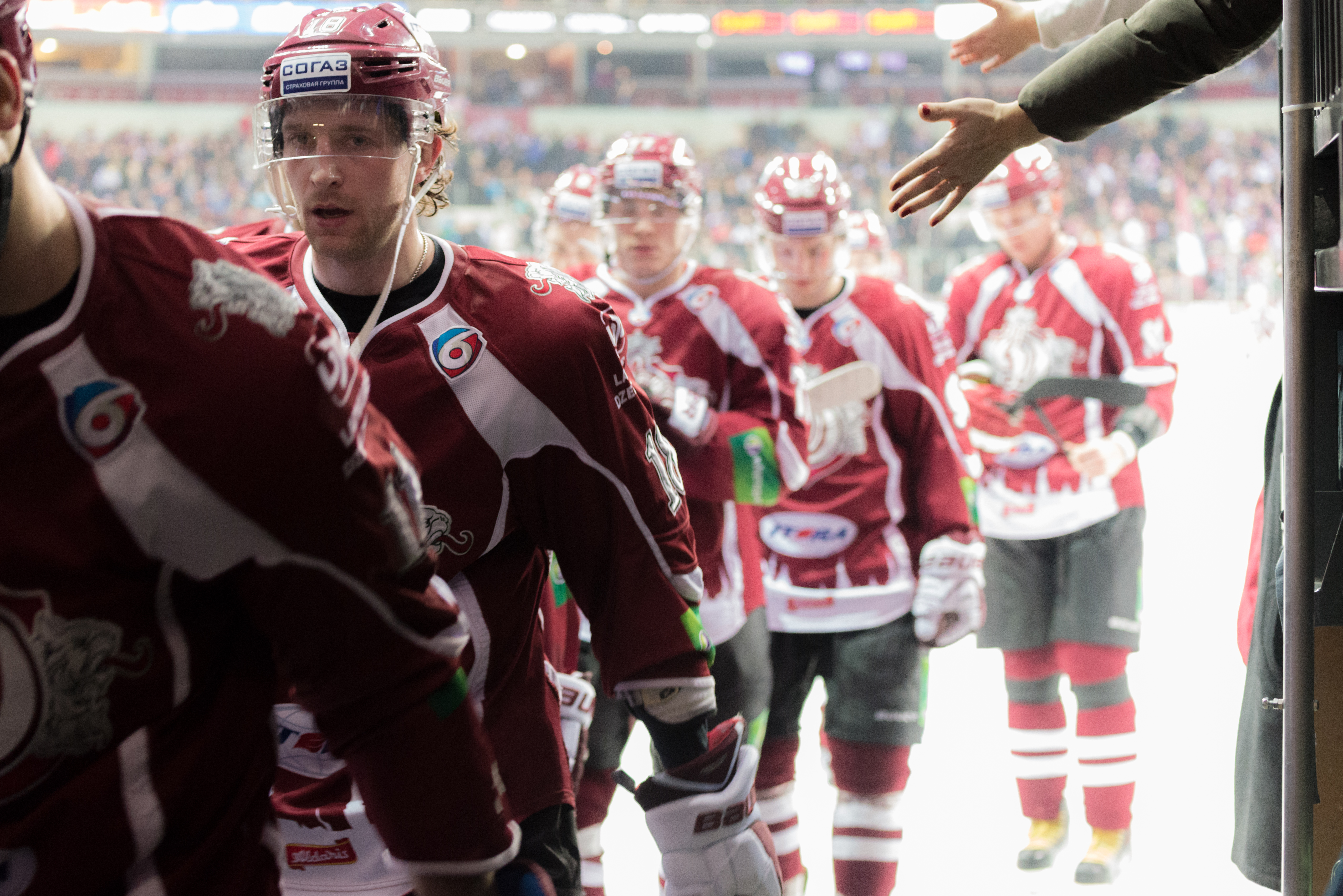 #18 Kyle Wilson, Dinamo Riga vs HC Lev Praha 2013-12-28, Arena Riga